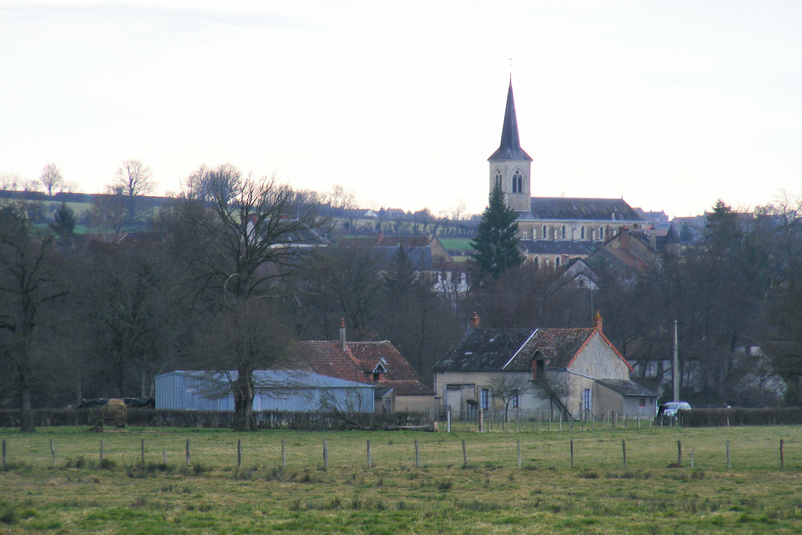 Rémilly, Nièvre